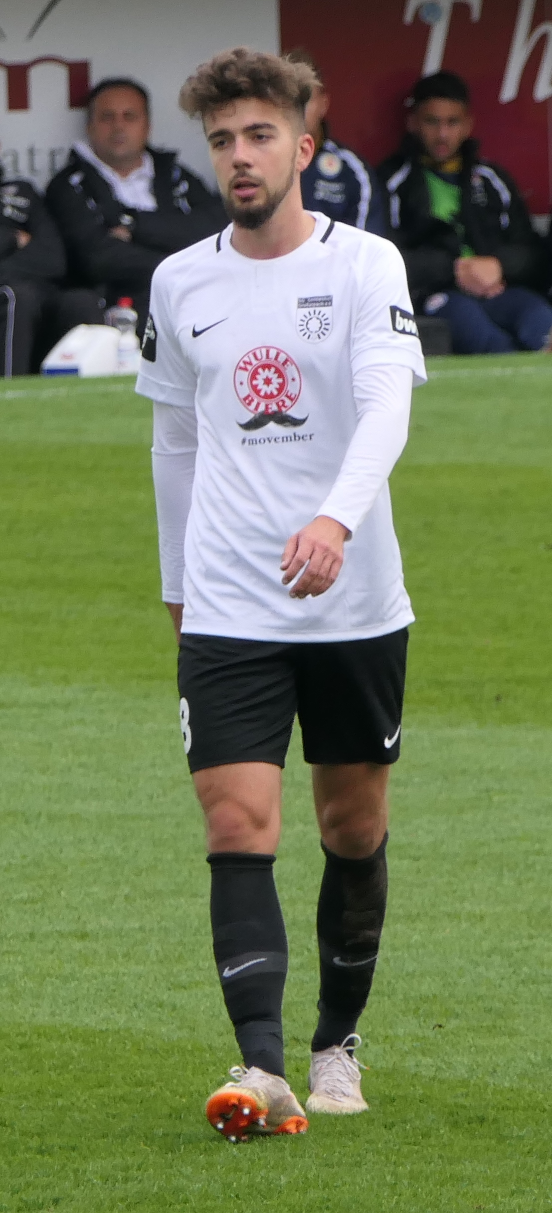 Der Fussballprofi Dominik Pelivan im Trikot der SG Sonnenhof Großaspach beim Heimspiel gegen Eintracht Braunschweig am 03.11.2018.